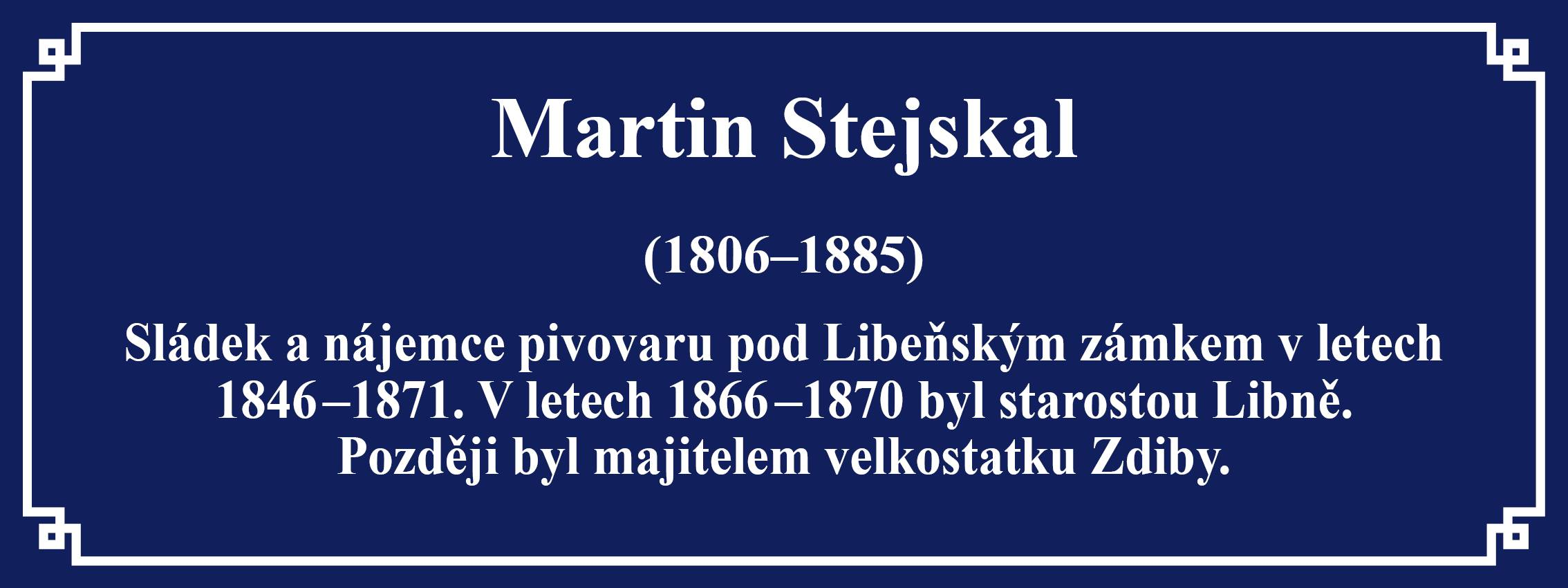 Deska starosty Prahy -Libně Martina Stejskala, umístěná v jeho jménem pojmenované ulici